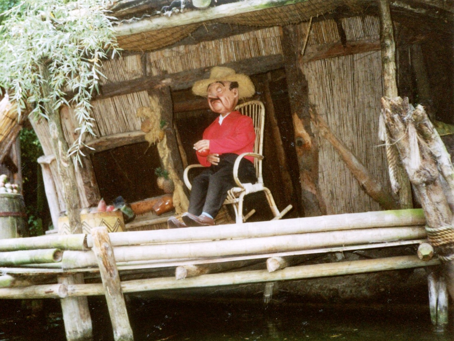 BellewaerdeLambique